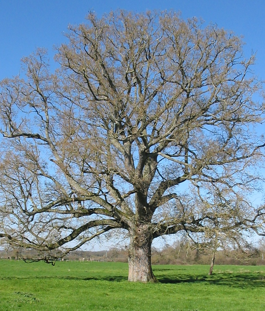 Le vieux chêne de la Villenière à La Pouëze (Maine-et-Loire, France).